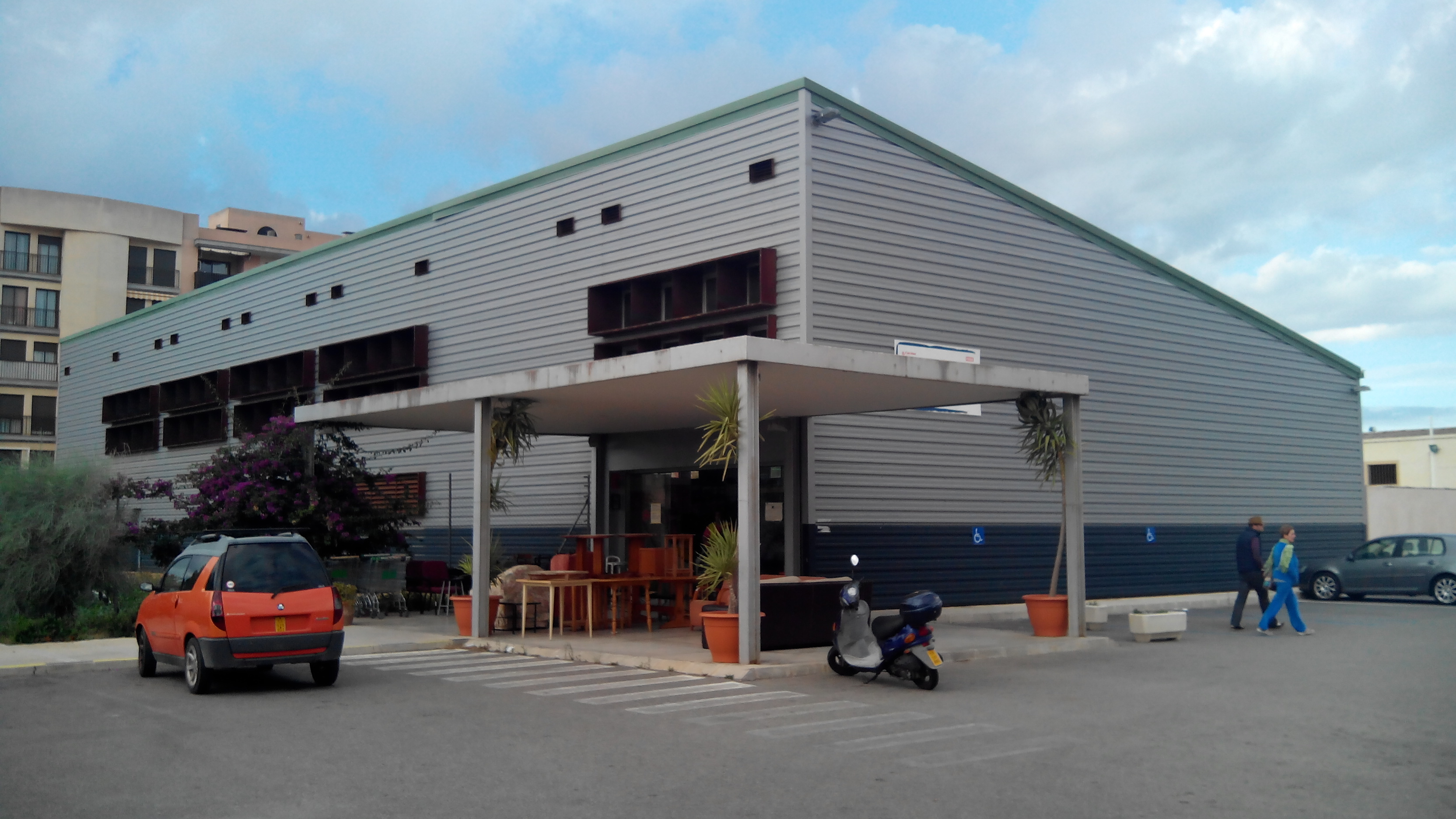 Fundació Deixalles